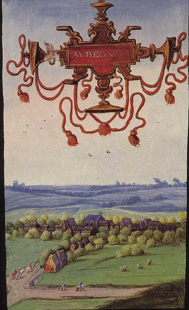 Cartulaire d' Aubigny au Bac en l'album de Croÿ dessiné par Adrien de Montigny avant 1615